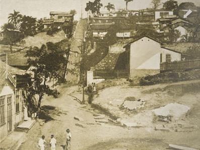 Morro do Livramento, Rio de Janeiro, onde Machado Nasceu (a seta aponta no alto do canto direito a possível casa de nascimento)